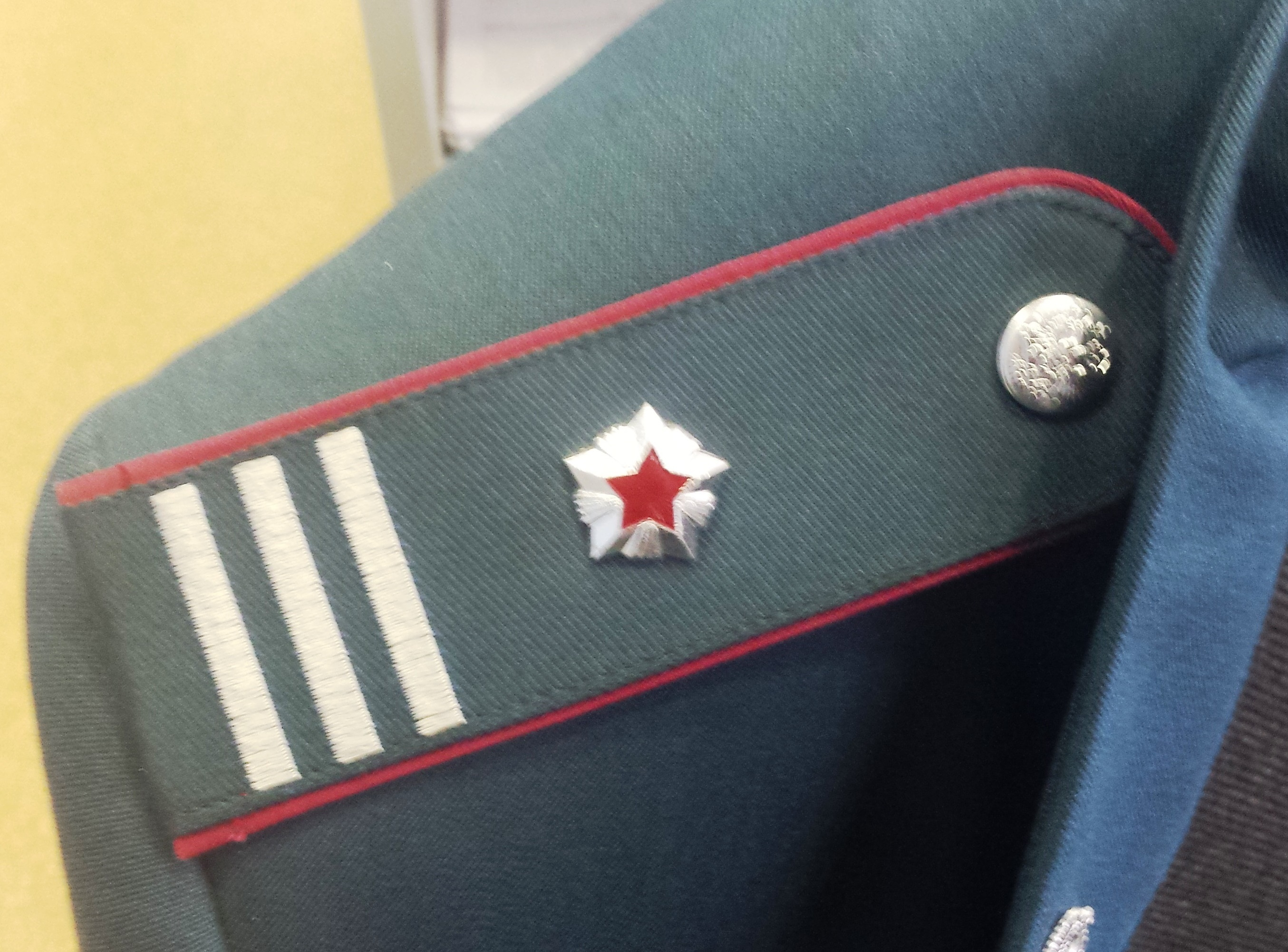 Погон советника государственной гражданской службы РФ 3 класса